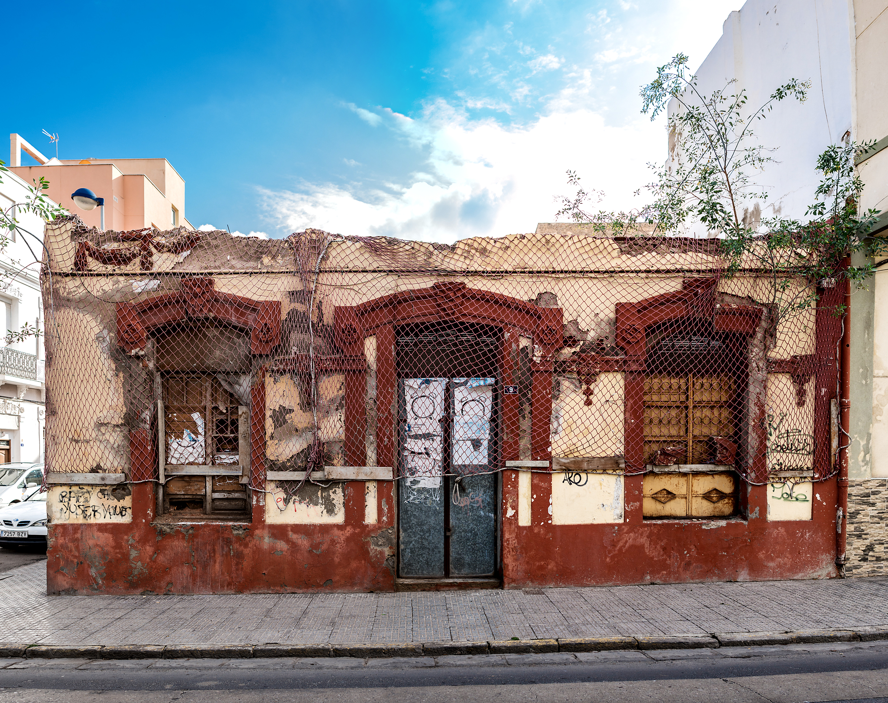 El Cine Español era un cine modernista situado en la Calle Jiménez e Iglesias de la ciudad española de Melilla y forma parte del Conjunto Histórico Artístico de la Ciudad de Melilla, un Bien de Interés Cultural.